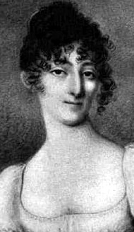 Fürstin Elisabeth zu Fürstenberg (1767-1822), geb. von Thurn und Taxis